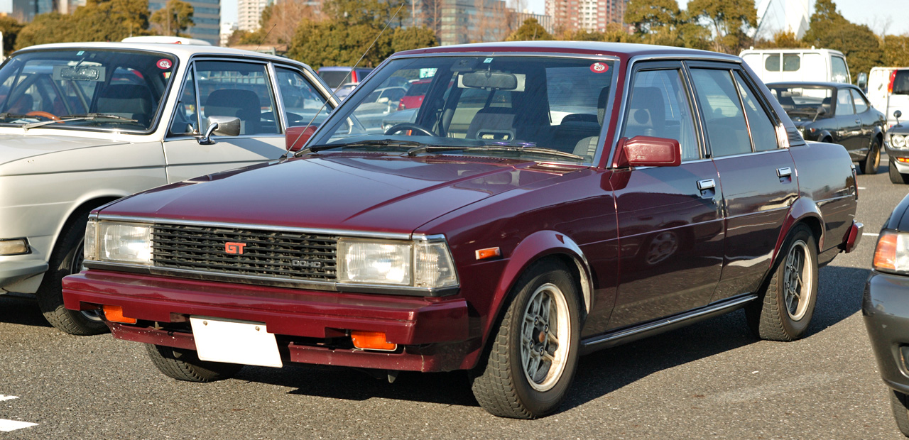 Toyota Corolla 4 door Sedan 1600 GT ( TE71 )